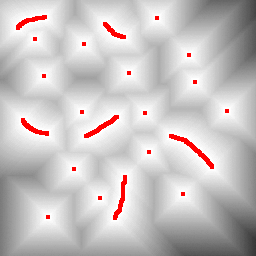 Maxima (rouge) d'une image en niveaux de gris